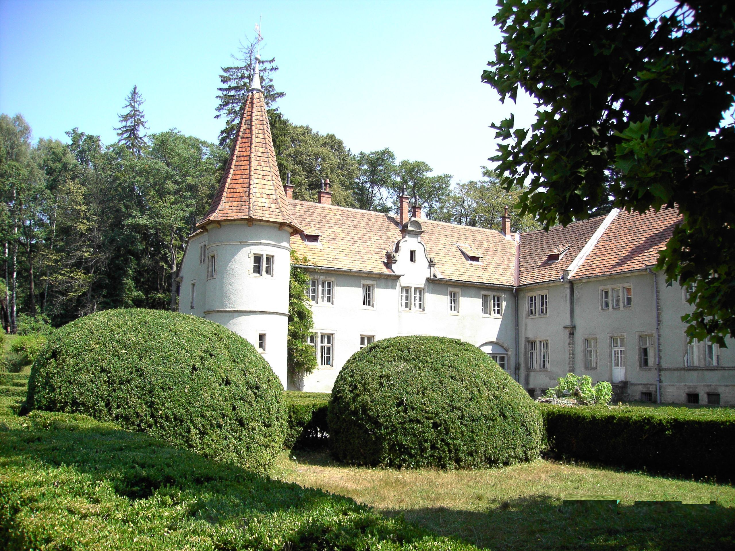 Palac_grafiv_Shenborniv-3.jpg: Палац графів Шенборнів (Мукачівський район)